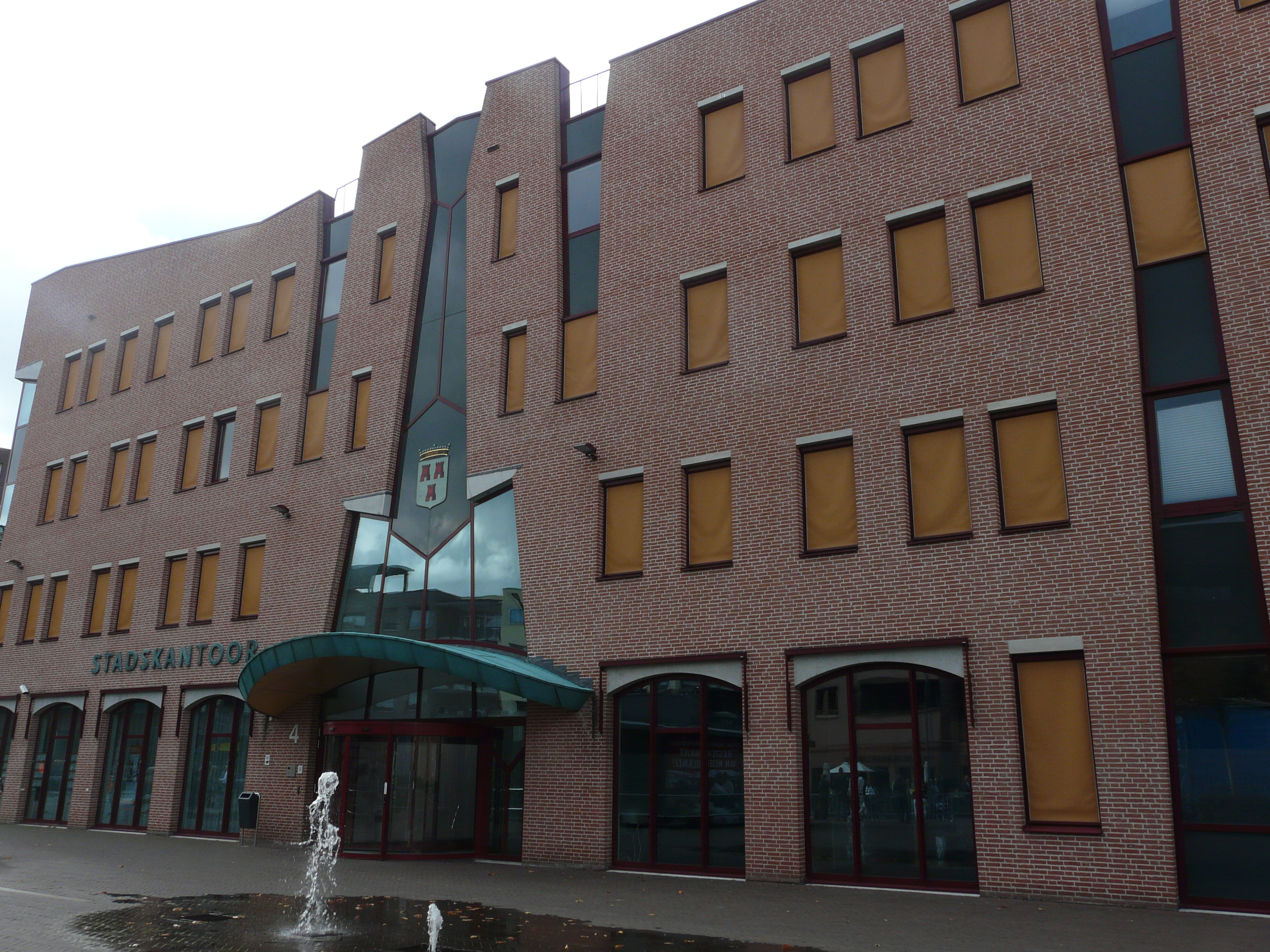 Stadskantoor van Etten-Leur